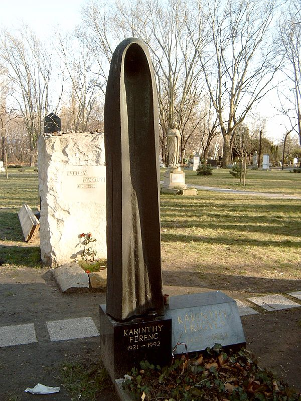 Karinthy Frigyes (Bp., 1887. jún. 24. – Siófok, 1938. aug. 29.): író, költő, műfordító, kritikus és fia, Karinthy Ferenc (Budapest, 1921. június 2. – Budapest, 1992. február 29.) magyar író, drámaíró, dramaturg sírja Budapesten. Kerepesi temető: 41-1-35 [szobrász: Borsos Miklós]